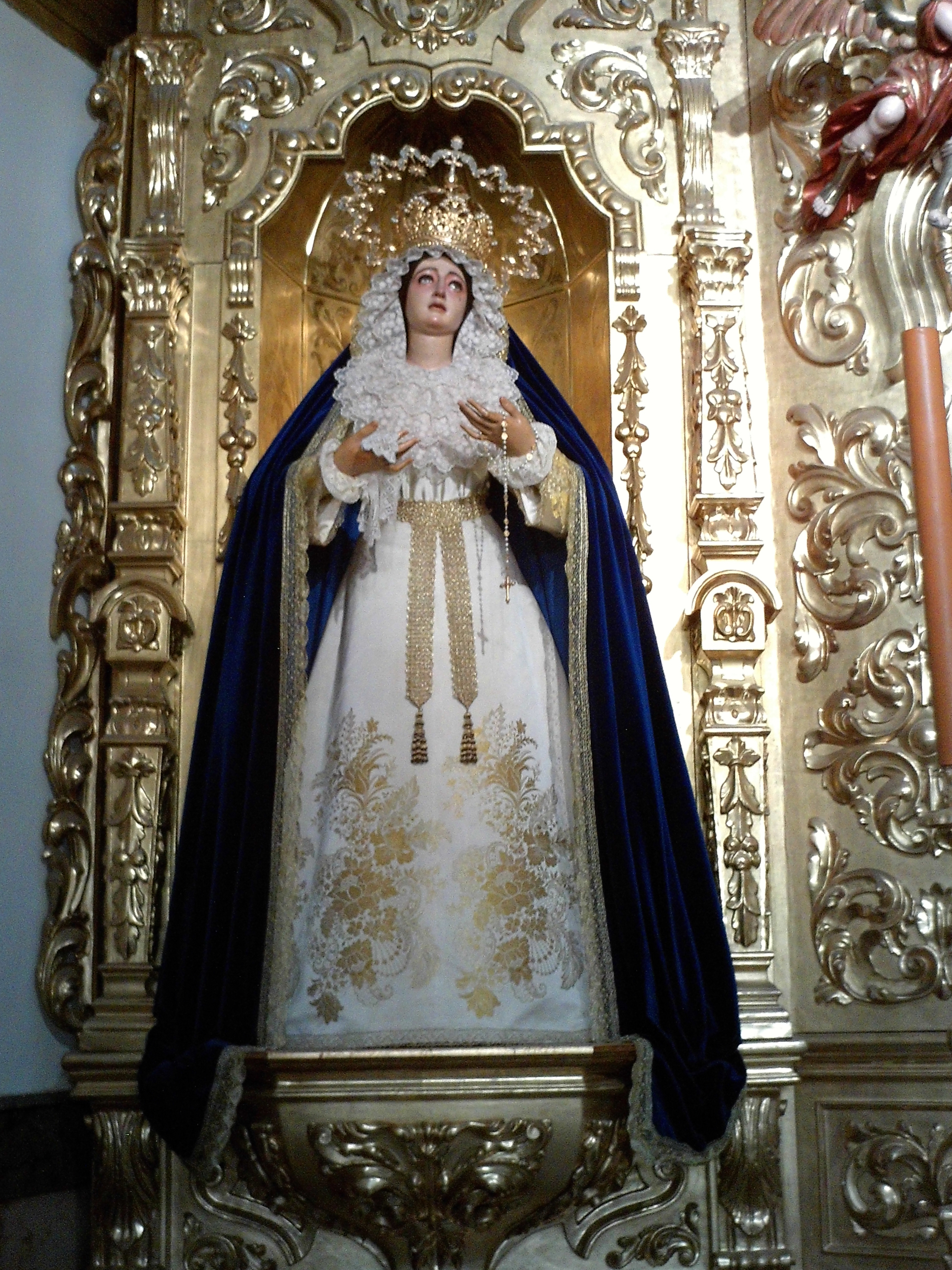 Madre de Dios de Palma. Sevilla, Andalucía, España.